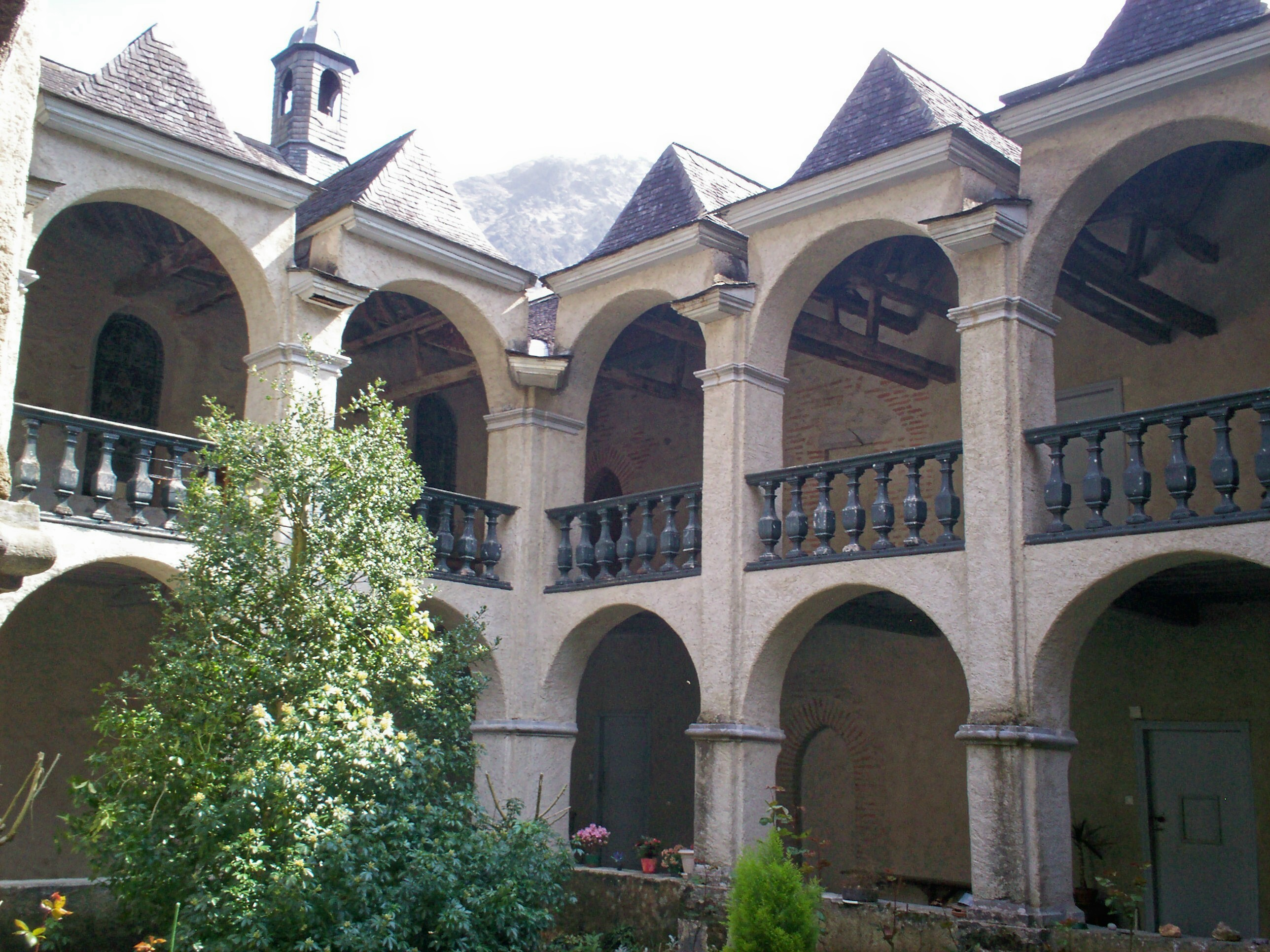 Claustre de la glèisa de Sarrança